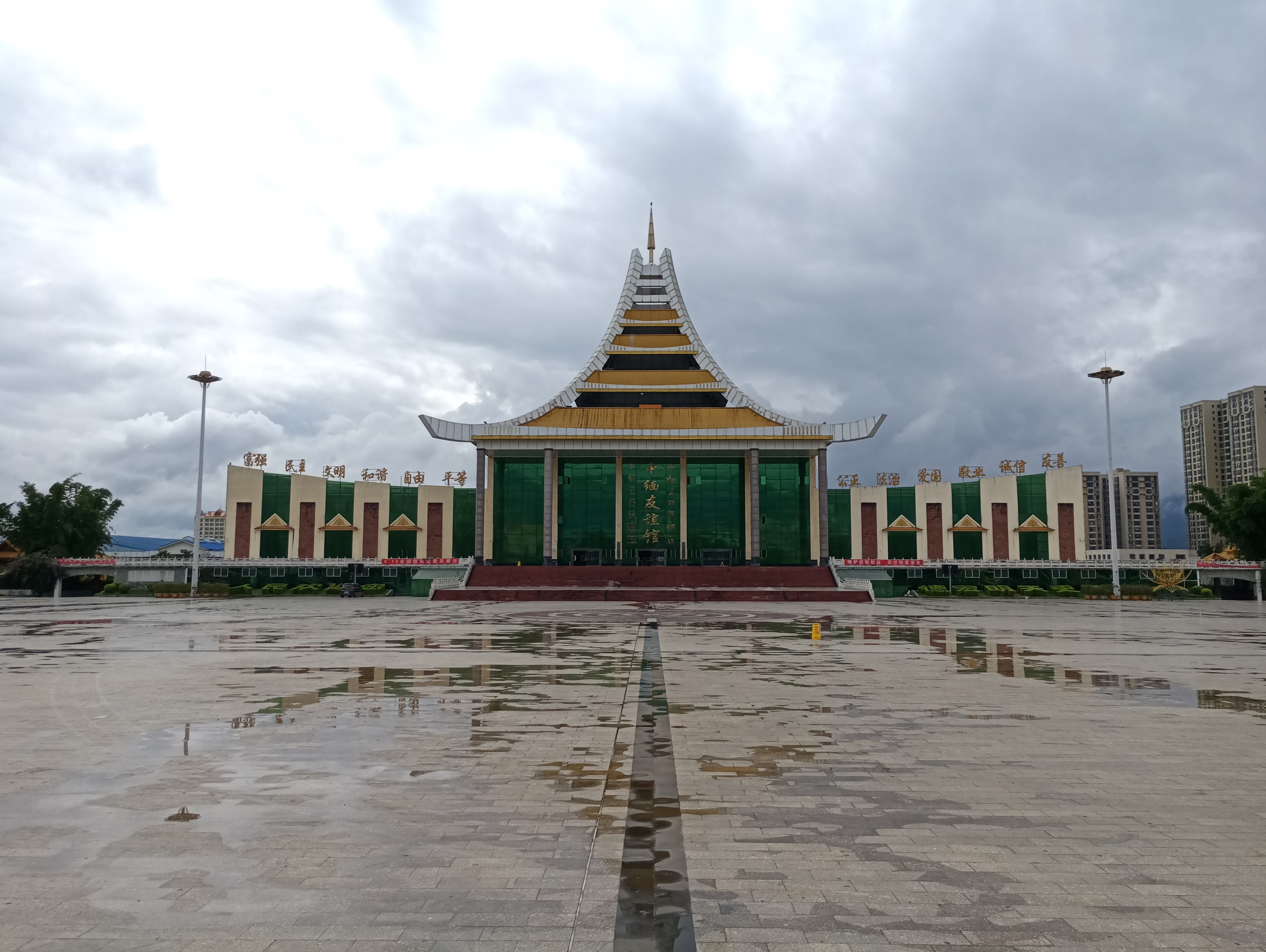 芒市广场-中缅友谊馆